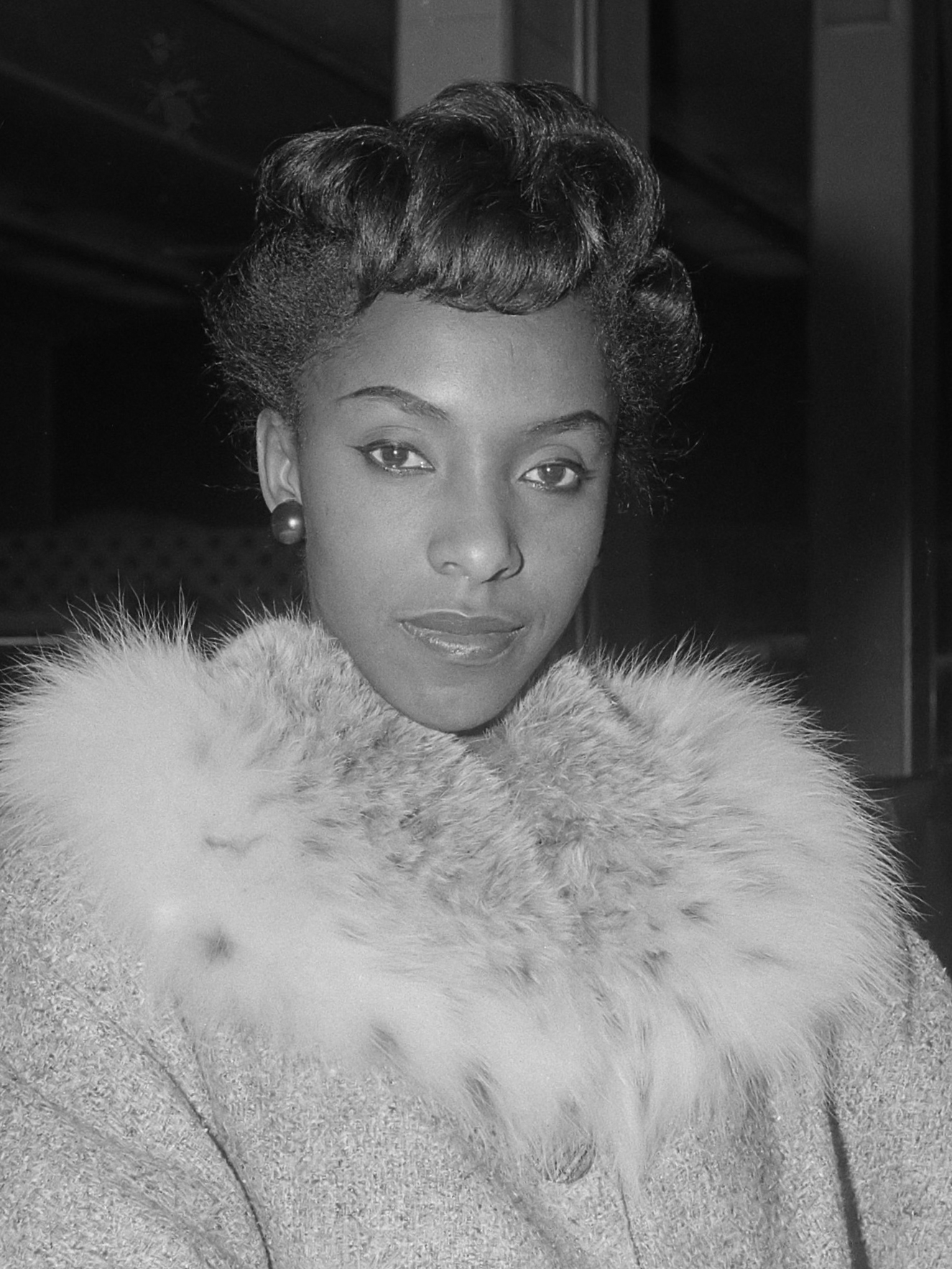 Elaine Delmar voor KRO-TV in ons land 27 maart 1962